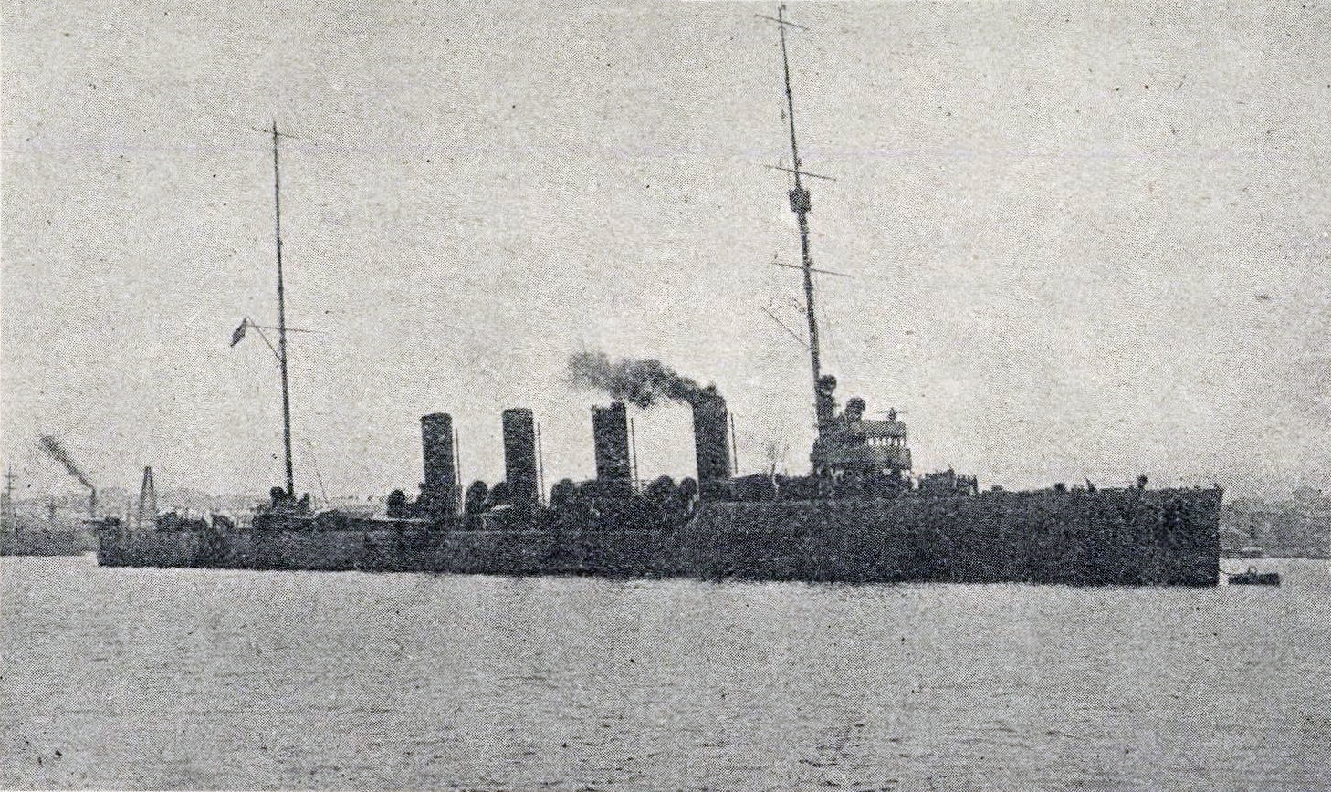 Az SMS Novara, Horthy Miklós zászlóshajója